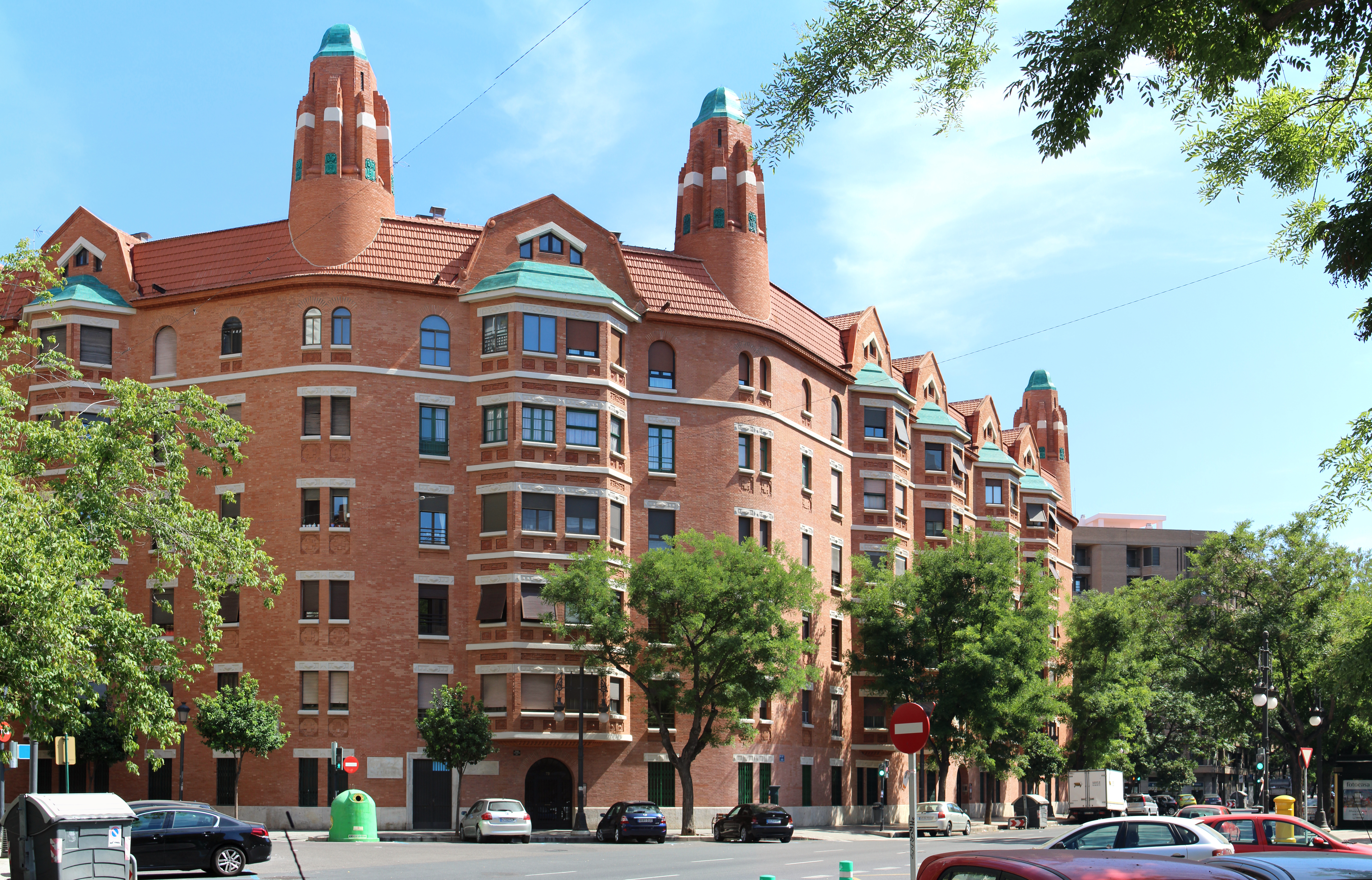 Fotografía de la Finca Roja de Valencia, España, tomada el 19 de junio de 2016